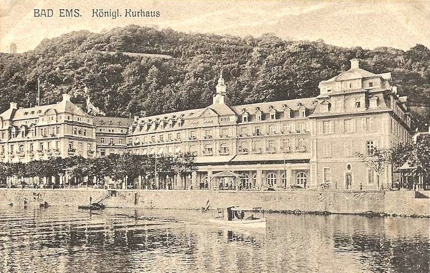 Bad Ems (ville thermale d'Ems), Kurhaus (maison de cure), avant 1914.